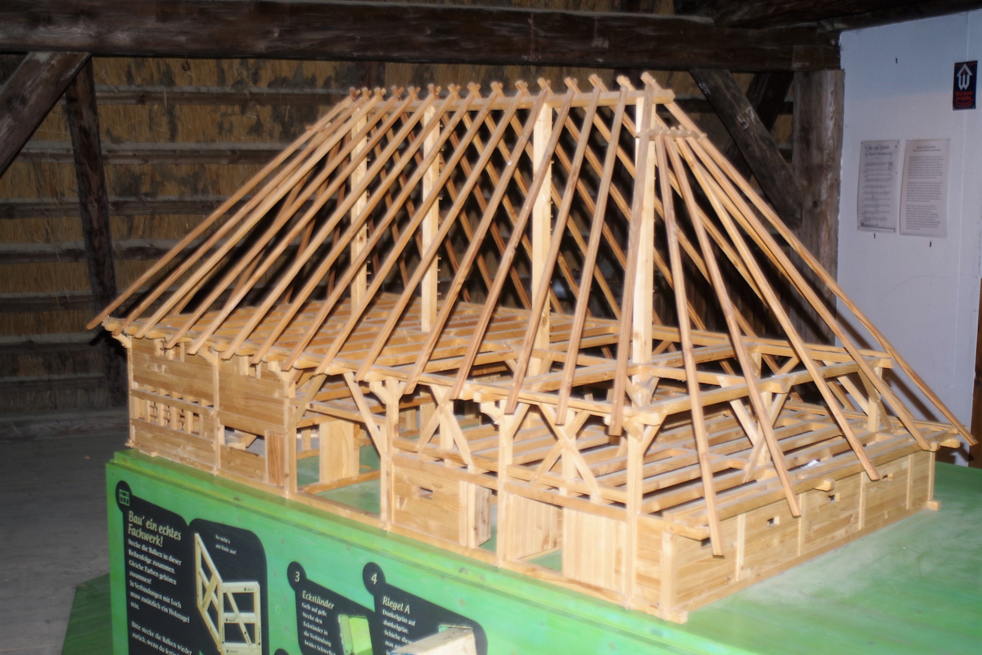 Modell des "Hueb", Strohdachhaus mit 4 Firstsäulen, Oberschwäbisches Museumsdorf Kürnbach